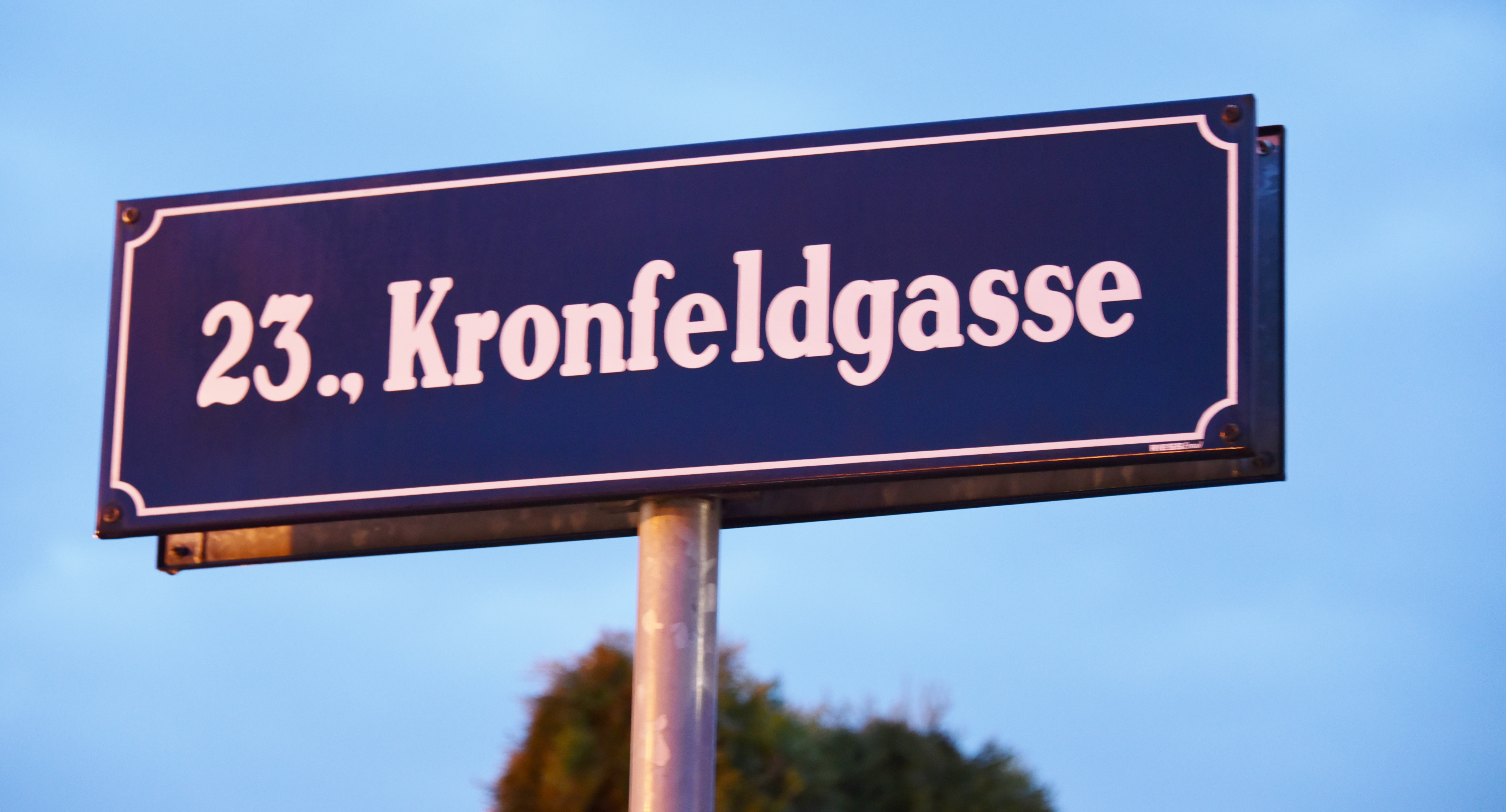 Straßenschild Kronfeldgasse